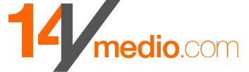 Logotipo de 14ymedio